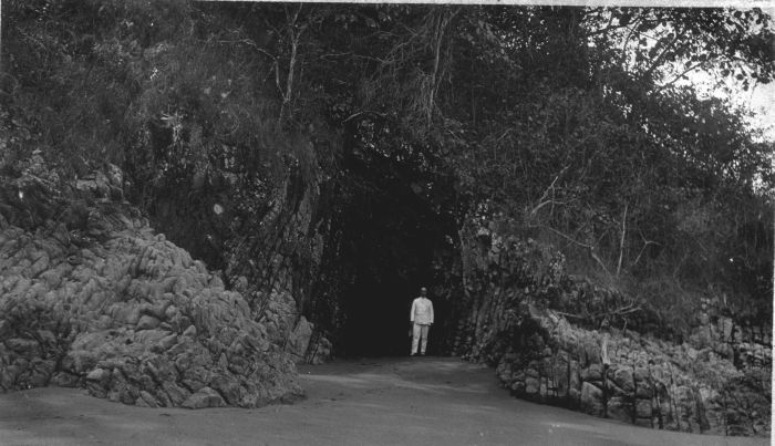 Foto. De ingang van een grot bij Palaboehanratoe aan de Wijnkoopsbaai, West-Java